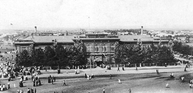 Старинное (дореволюционное) фото педколледжа